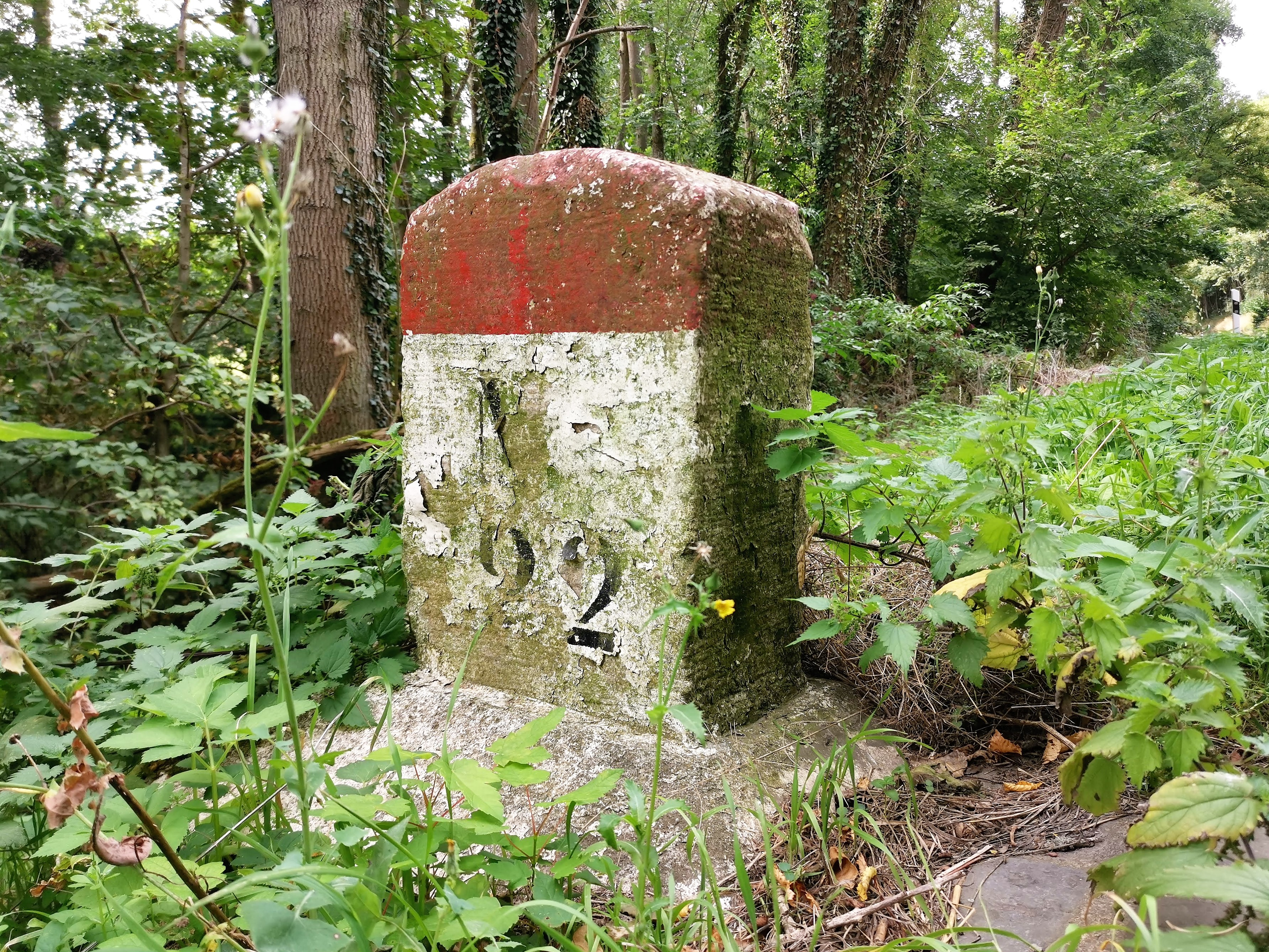 Borne kilométrique N22 entre Useldange et Boevange-sur-Attert.